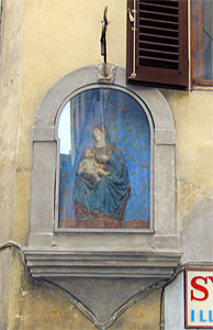 Palazzo del Paciarelli, piazza della Repubblica, Firenze.